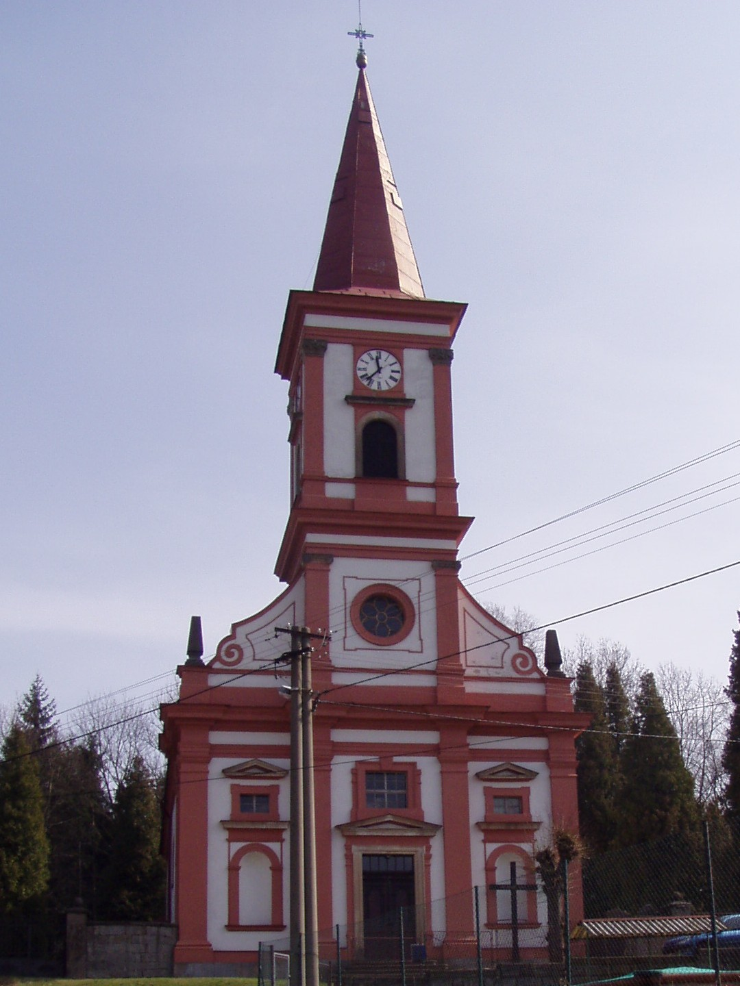 Kostel sv. Václav v Machově